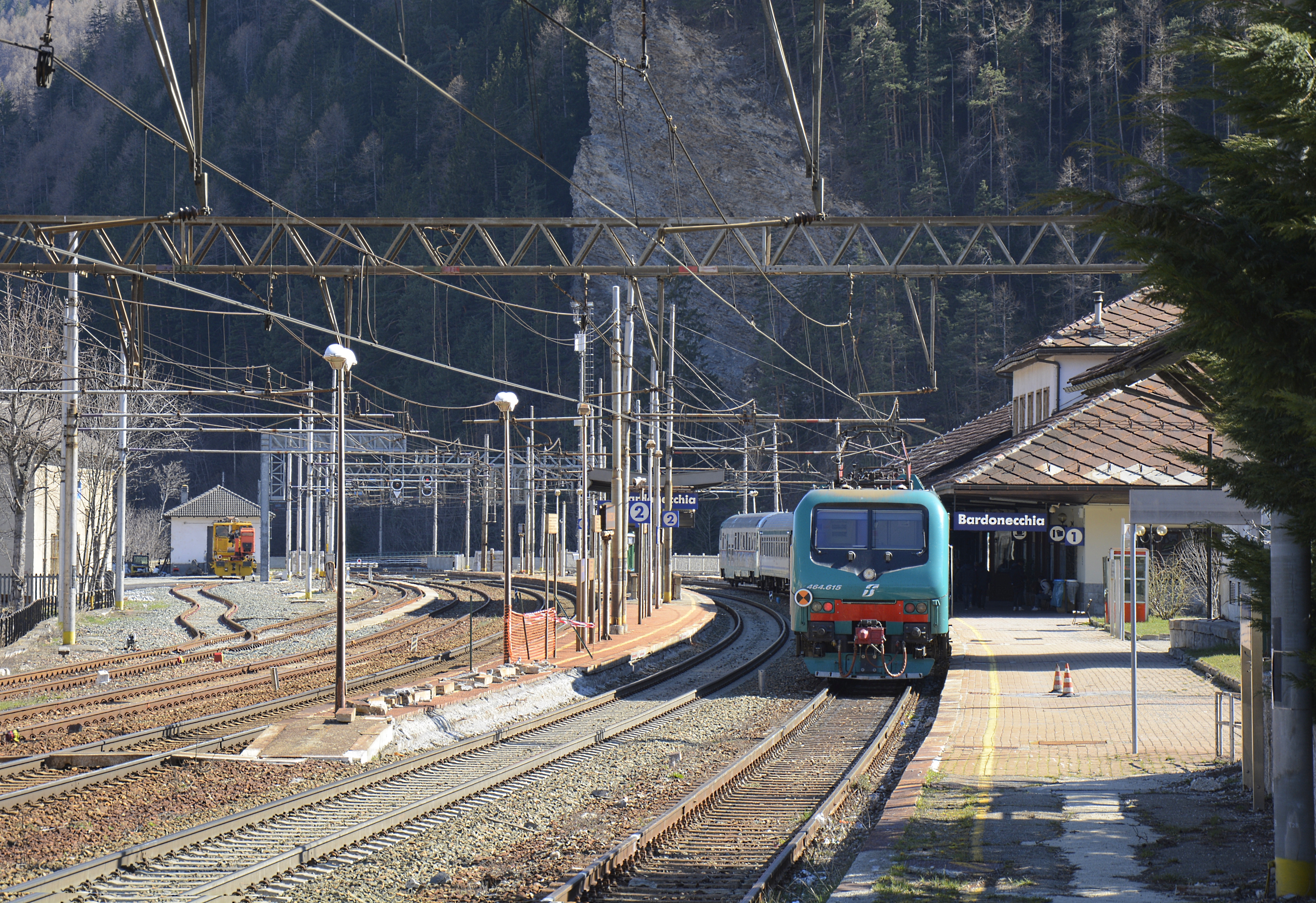 Treno della linea SFM3 in partenza da Bardonecchia per Torino, spinto dalla locomotiva E.464.615.